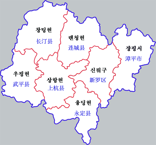 룽옌시 현급행정구역도